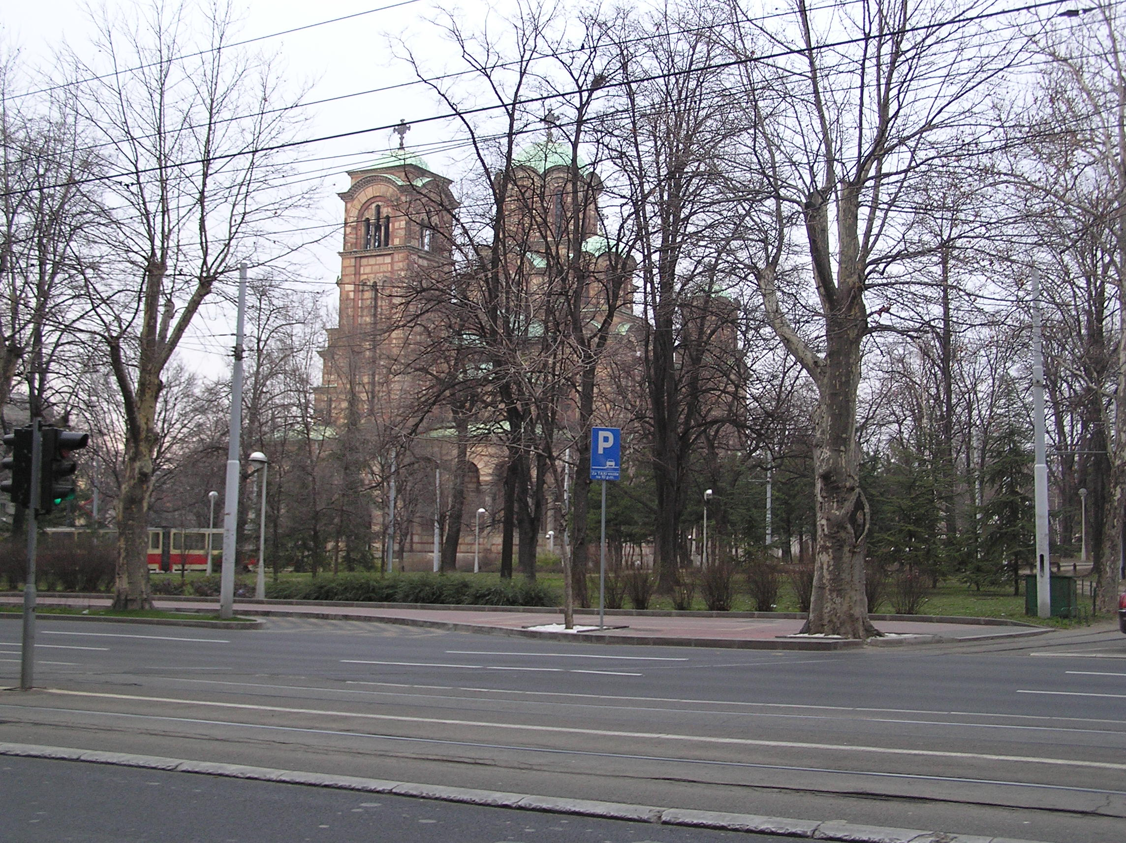 Tasmajdan Park in Belgrade